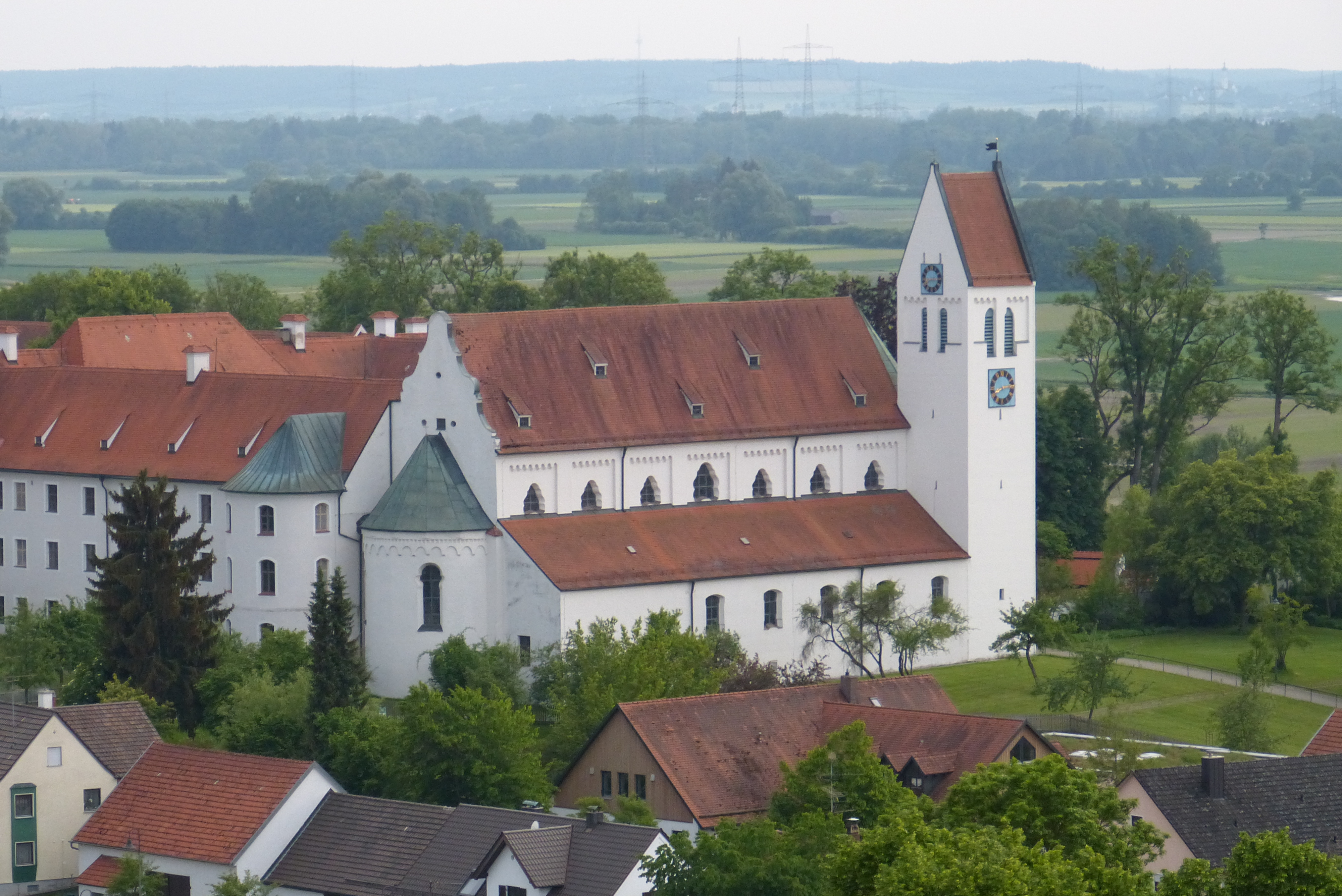 St. Peter und Paul (Thierhaupten), vom Kreuzberg aus fotografiert.